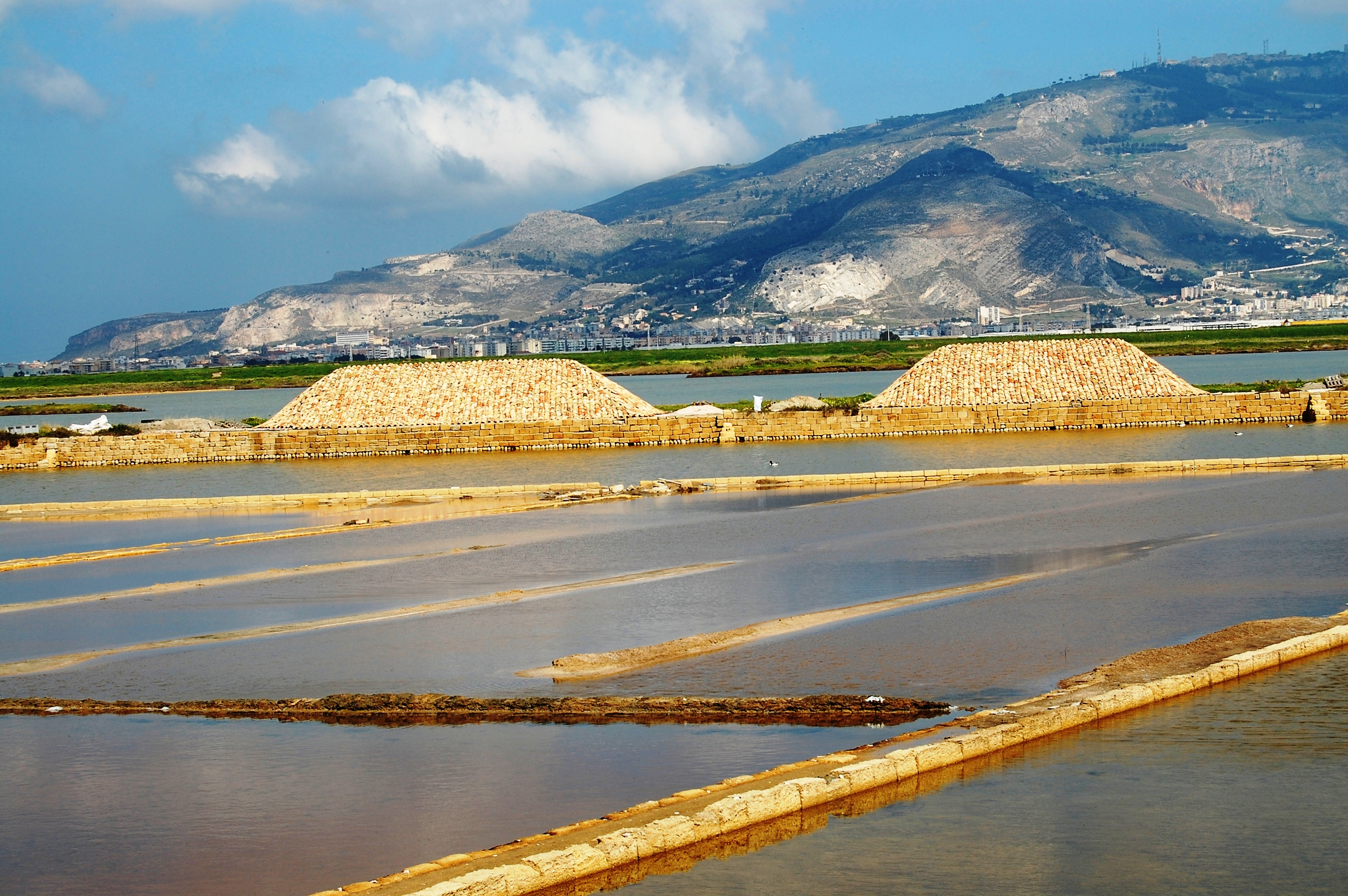 Riserva naturale Saline di Trapani, Sicily